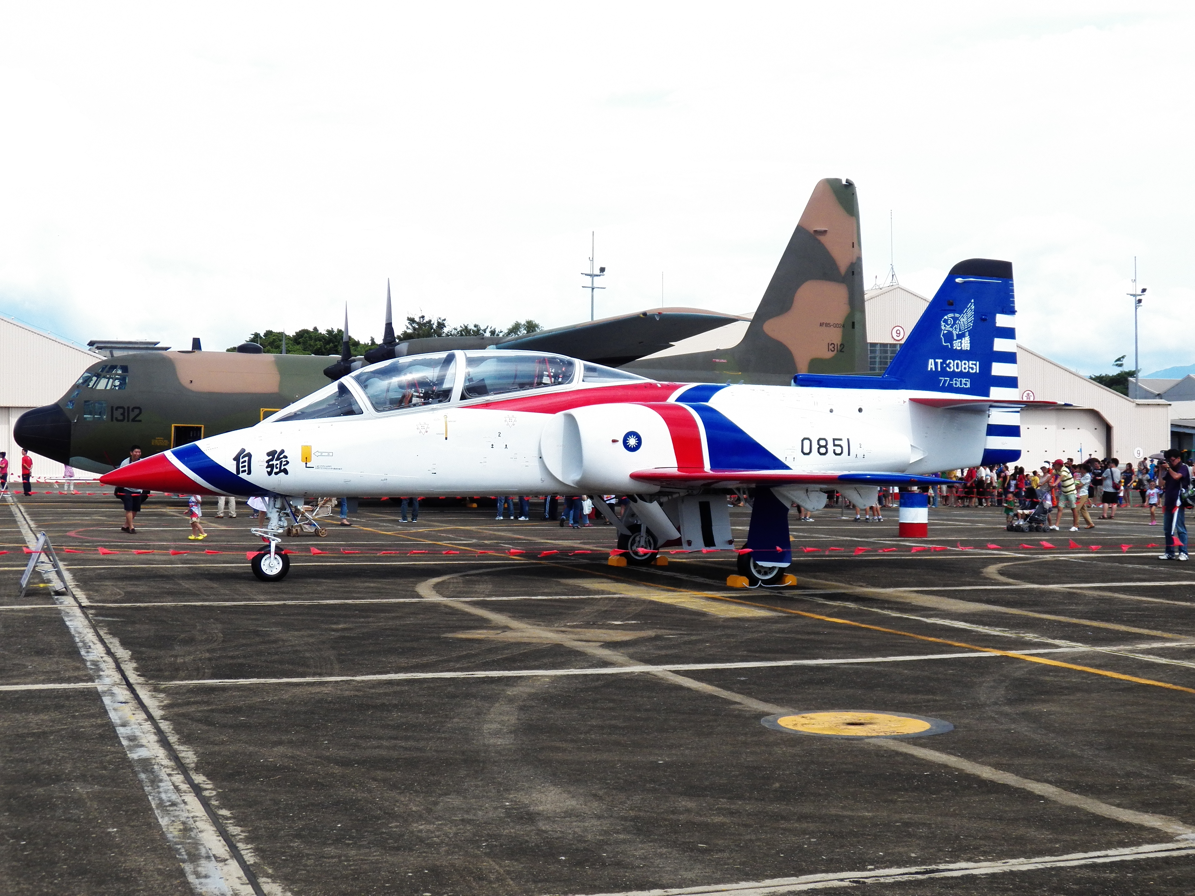 2012年空軍嘉義基地營區開放活動，停機坪靜態展示的AT-3 0851。